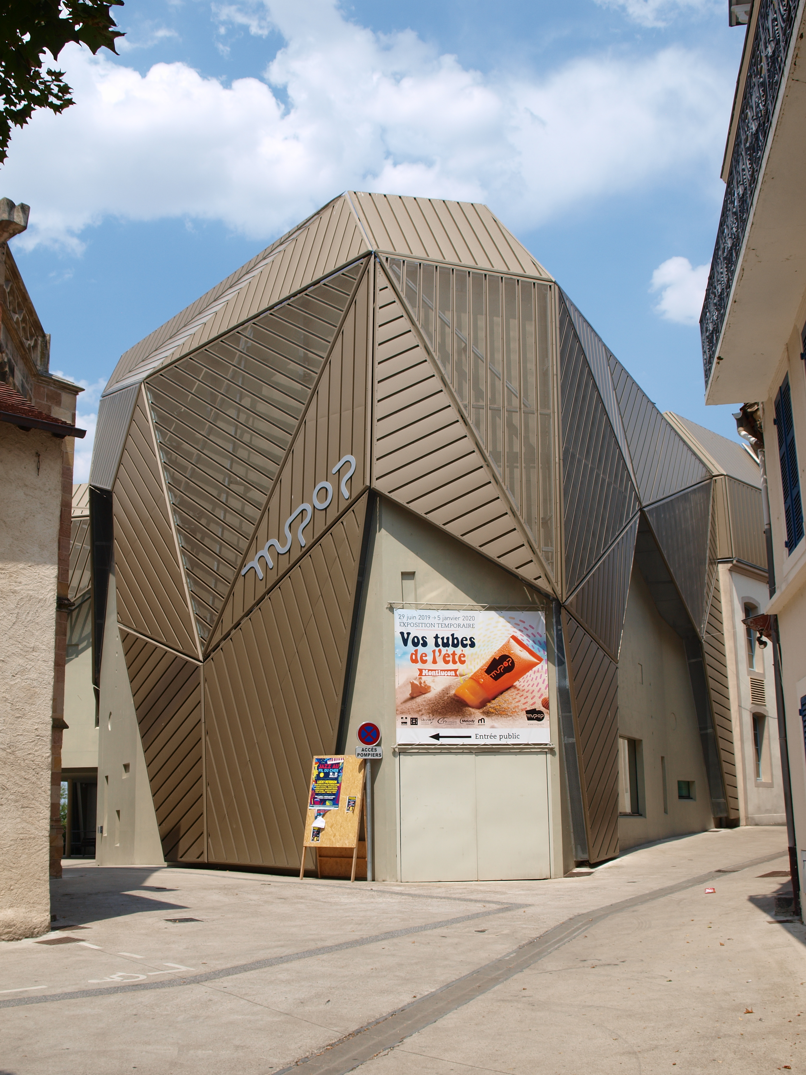 Le MuPop de Montluçon (Allier, France)